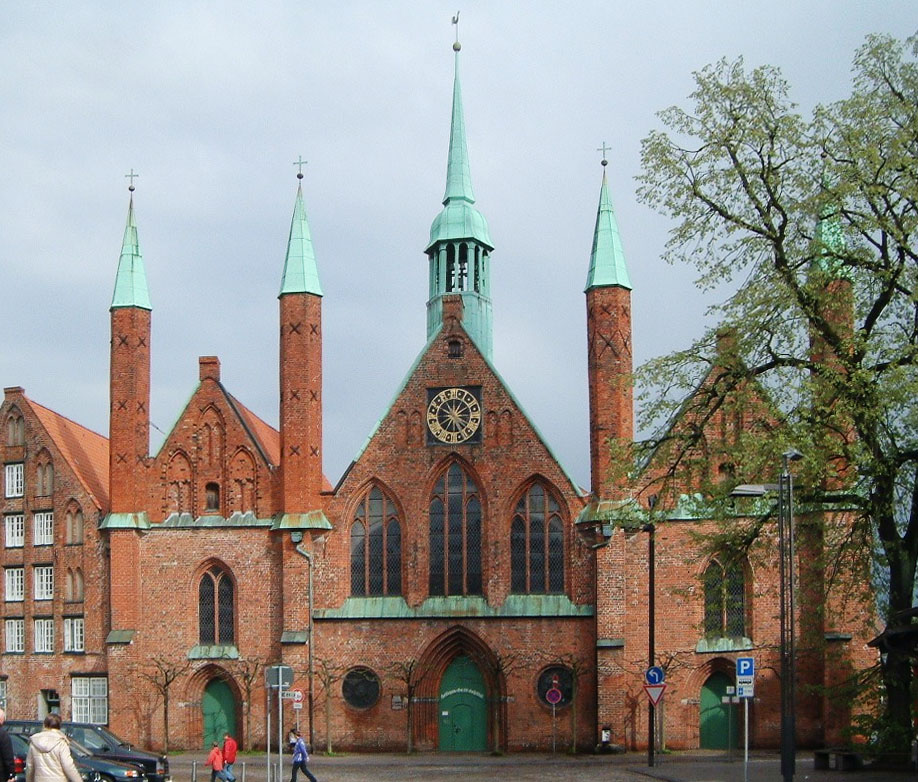 Fassade des Lübecker Heiligen-Geist-Hospitals. Die Linde rechts im Bild ist eingetragenes Naturdenkmal.